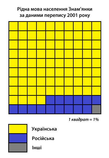 Інфографіка розподілу населення міста Знам'янка за рідною мовою згідно з даними перепису 2001 року. Джерело: Розподіл населення Кіровоградської області за рідною мовою (у % до загальної чисельності населення) за переписом 2001 року